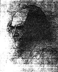 Andreas Röschlaub. Reproducció d'un dibuix de P. Von Cornelius.